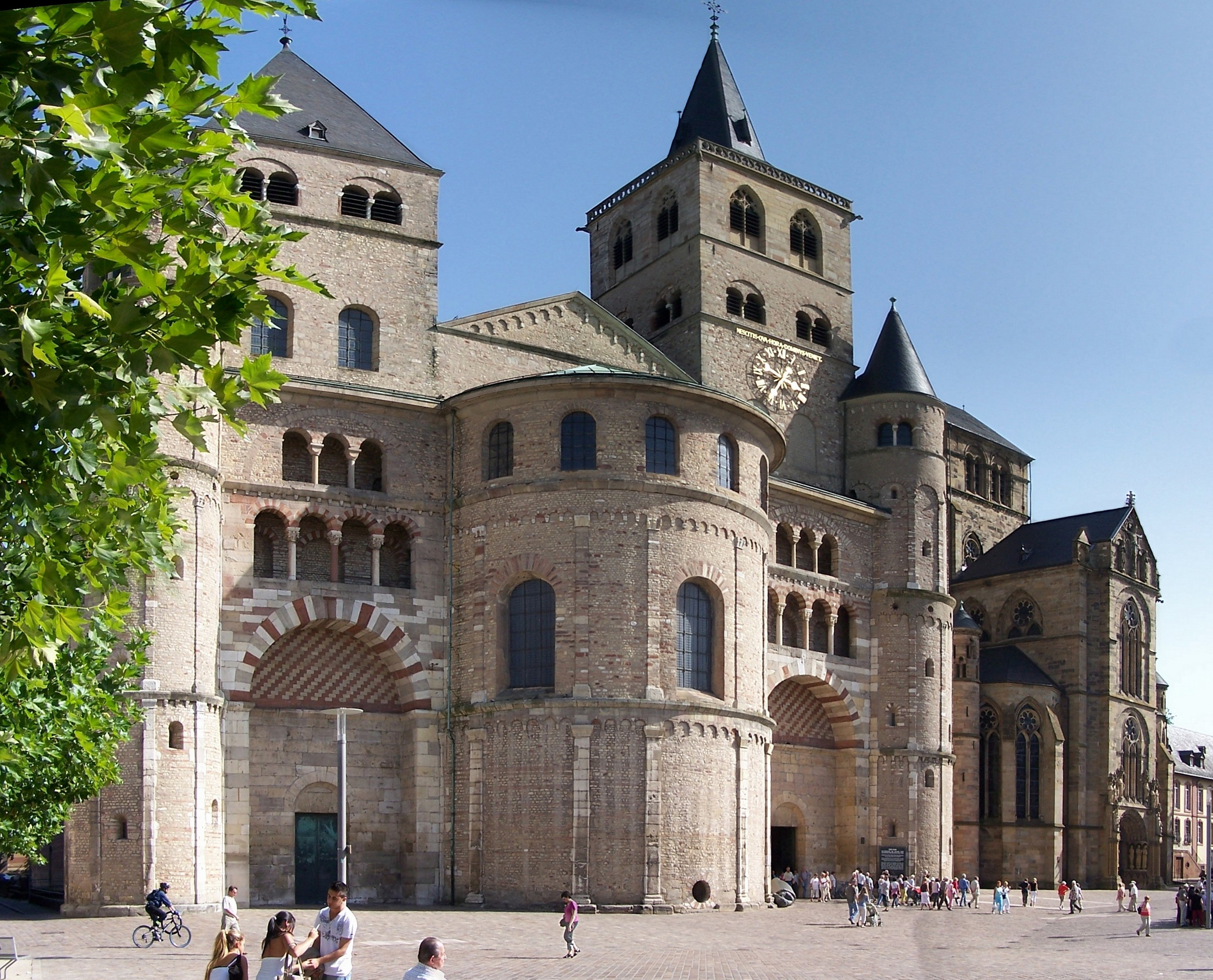 Dom und Liebfrauenkirche in Trier